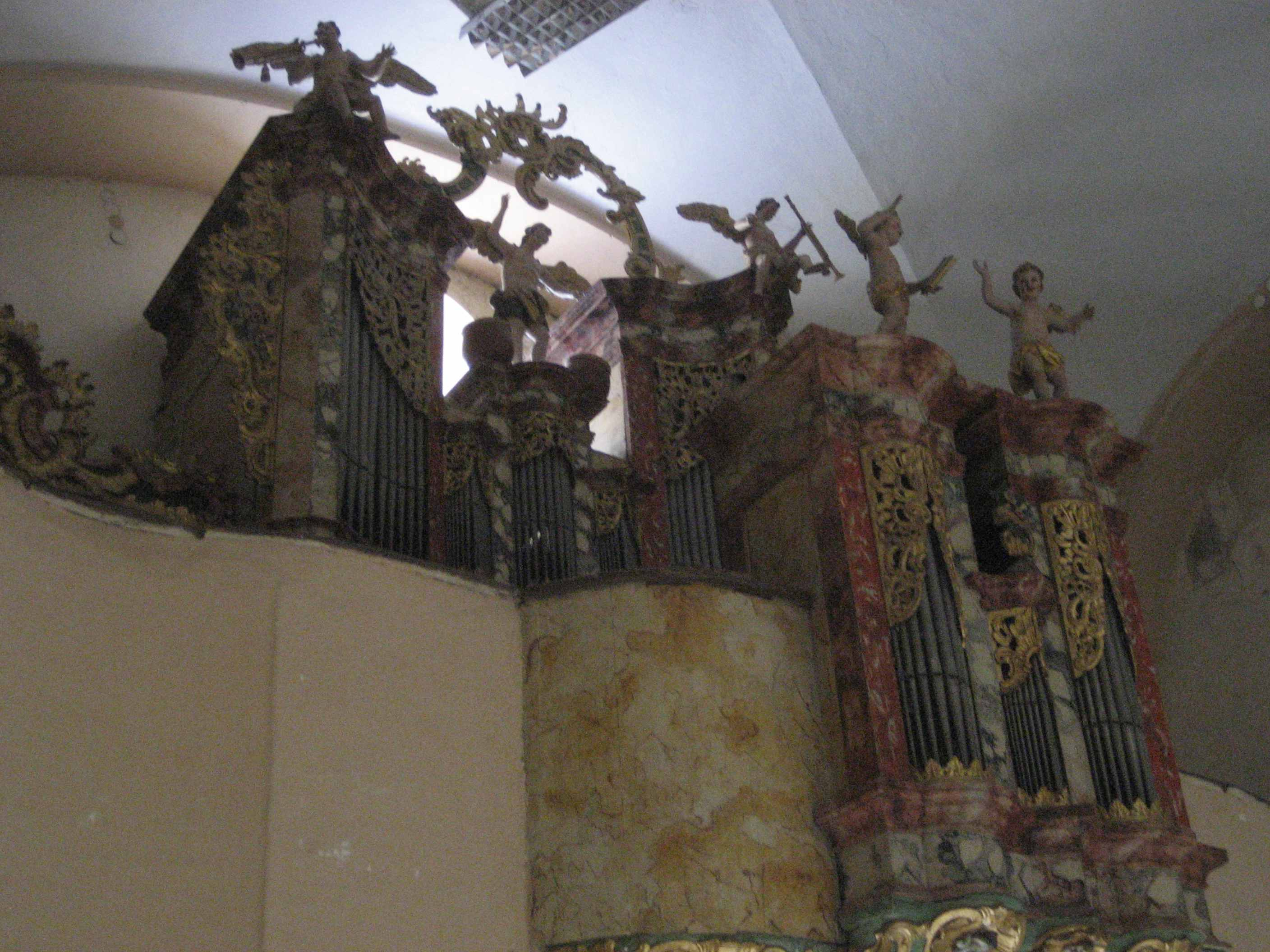 Orgulje u crkvi Sv. Marije Magdalene u Cazmi